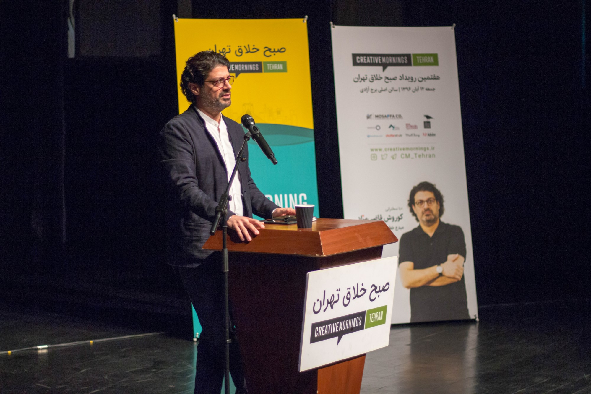 کوروش قاضی مراد در رویداد صبح خلاق تهران